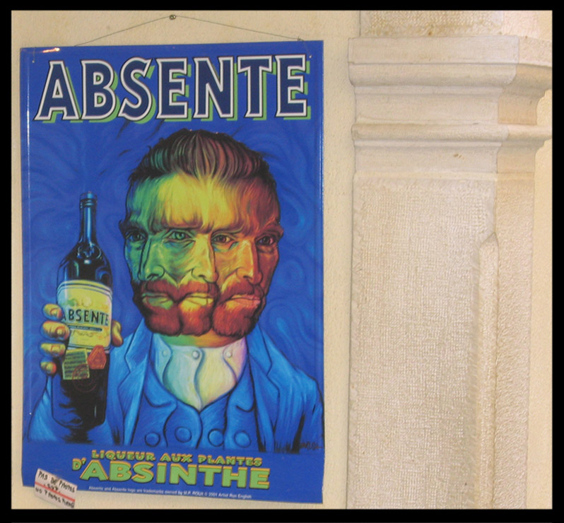 Saint Paul de Vence - France, 2004